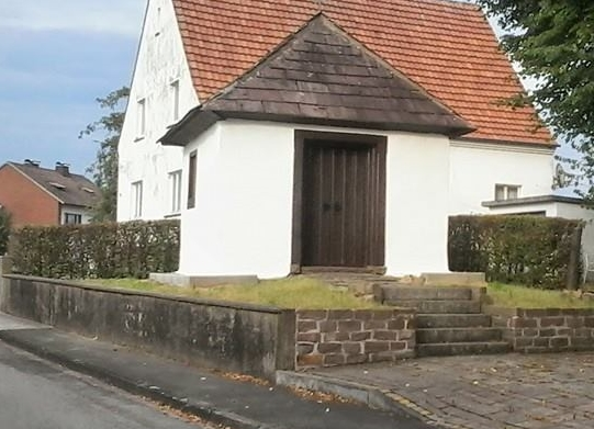 Antoniuskapelle Natzungen